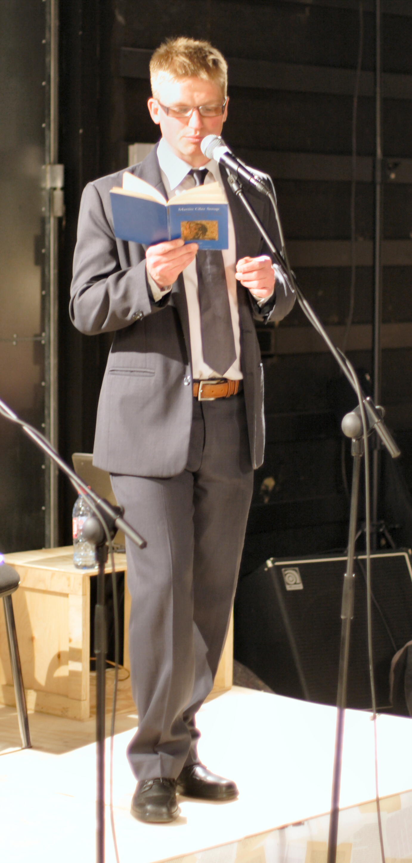 Martin Glaz Serup læser op på litteraturfestivalen "Vild med ord", 2010, Århus.